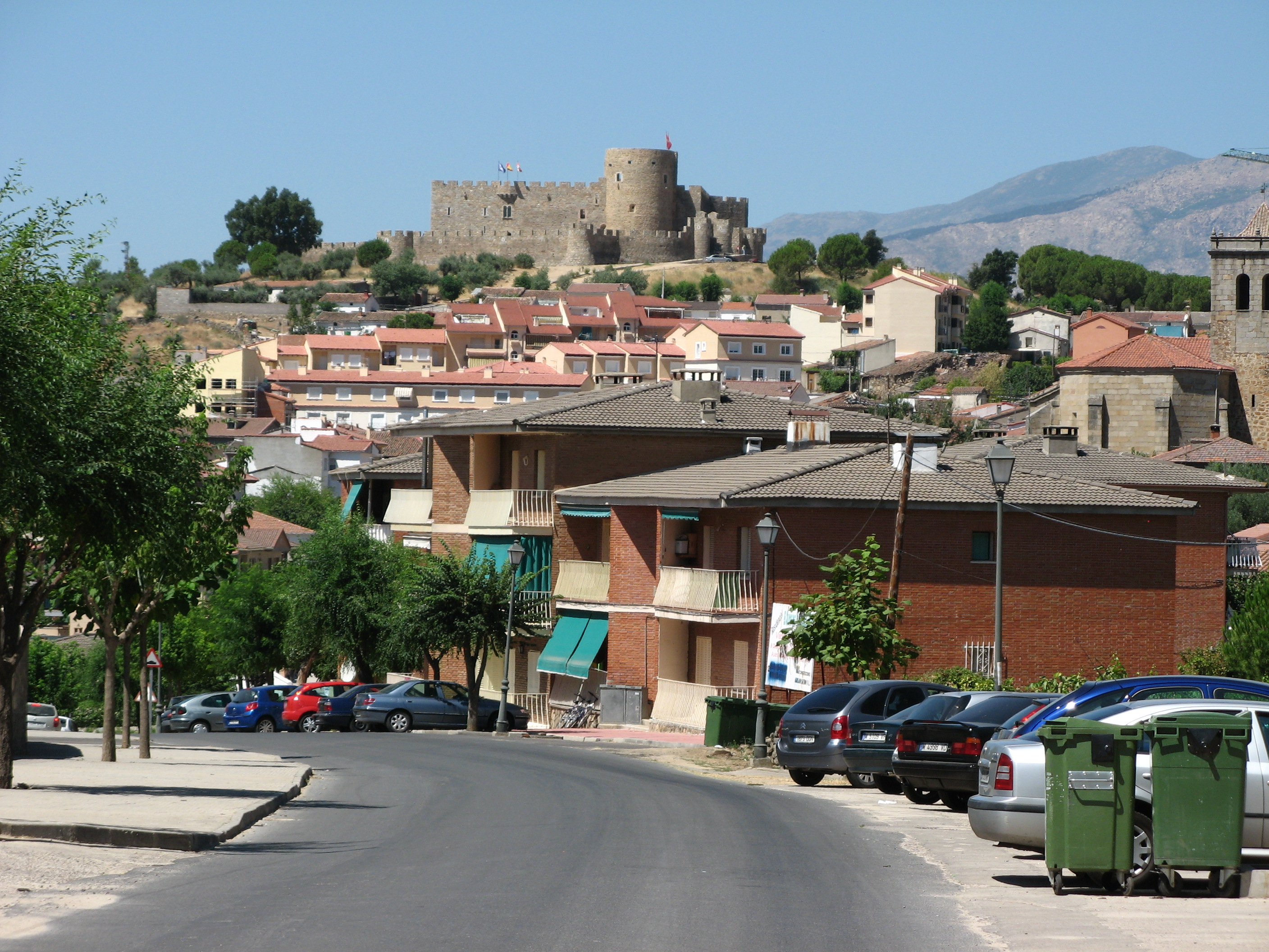 La Adrada Al fondo el castillo Provincia de Avila Castilla y León España